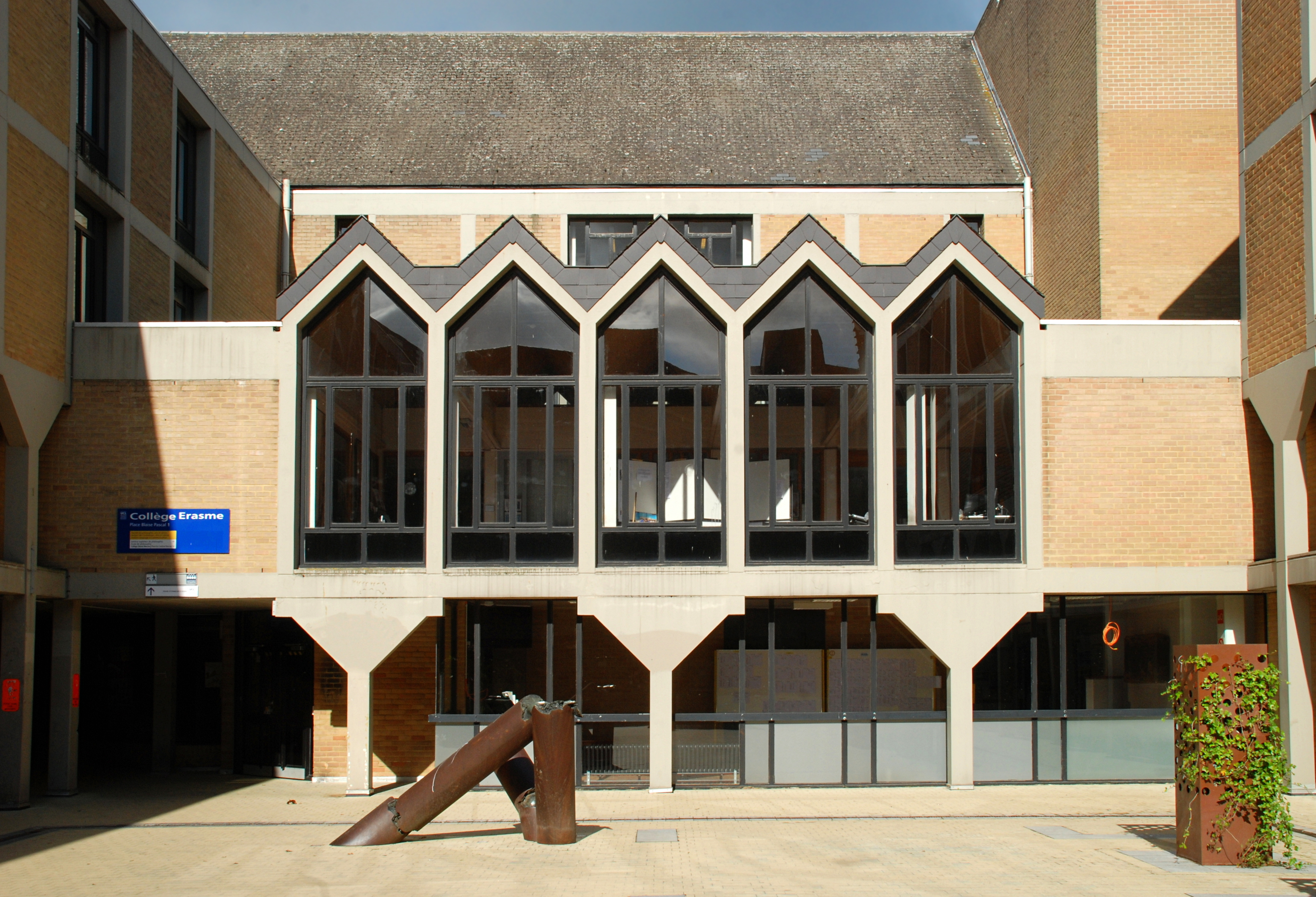 Belgique - Louvain-la-Neuve - Collège Erasme (ancien Musée de Louvain-la-Neuve)